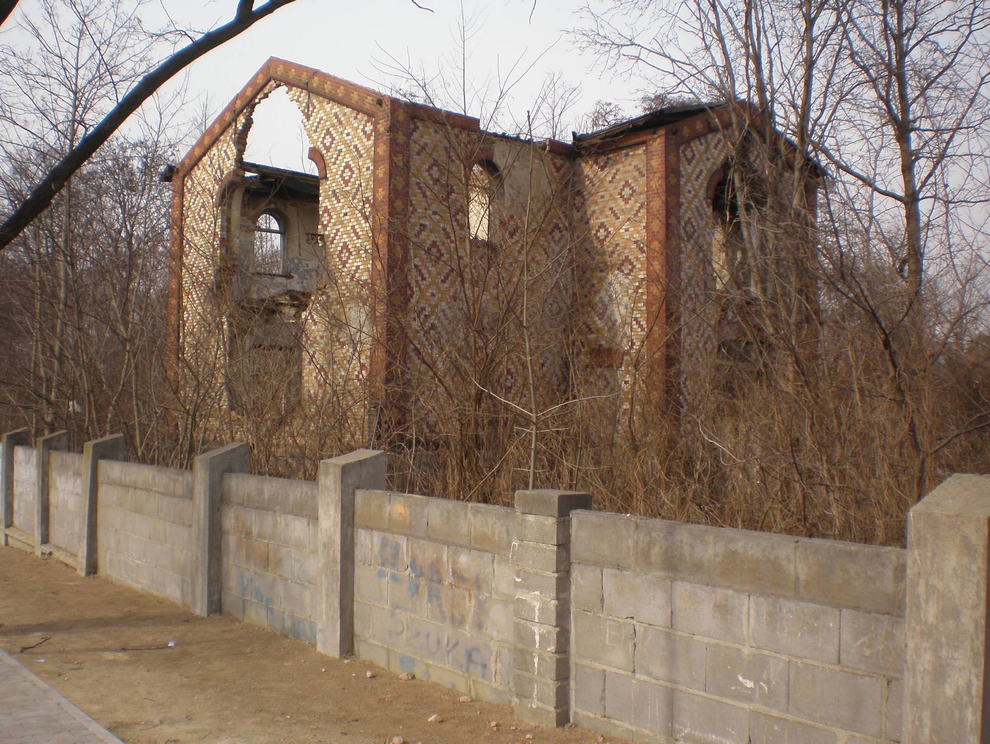 Willa Granzowa, Kawęczyn, Warszawa